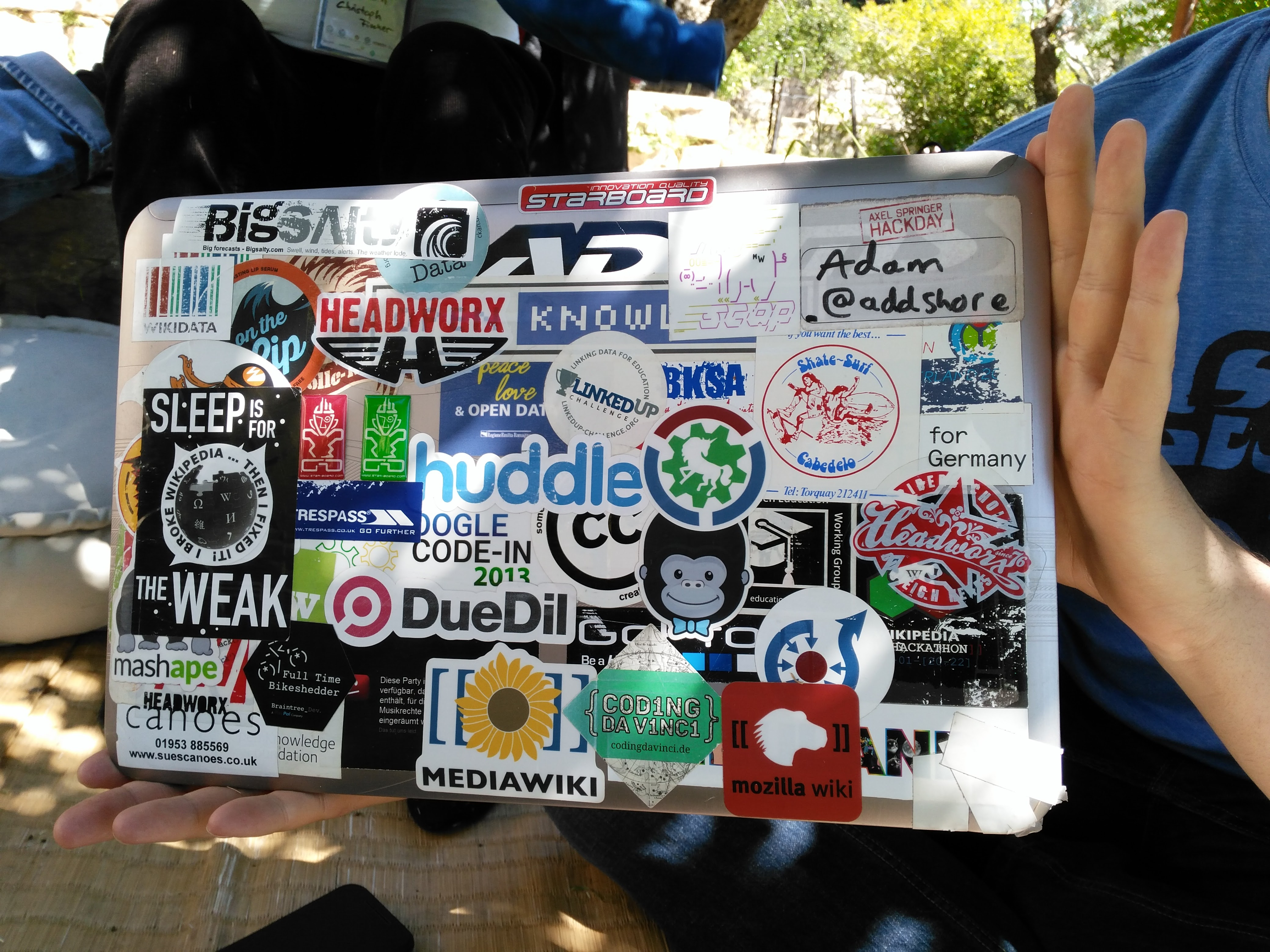 This foto was take on the MediaWiki Hackathon in Tel Aviv 2016. It shows stickers on a Developer Laptop.